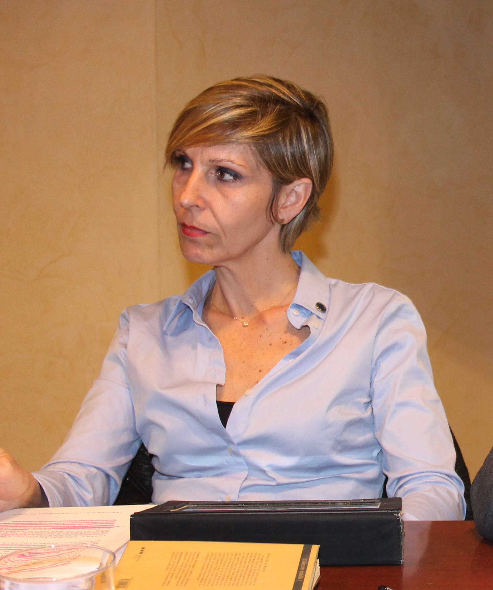 Beatriz Becerra (UPyD)